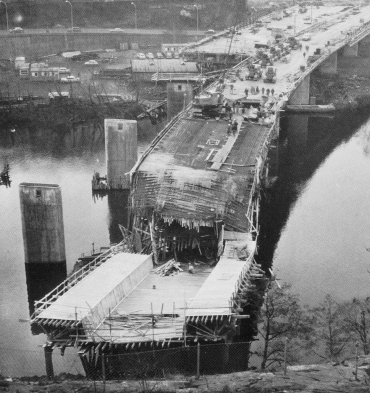 Rasolycka vid uppförandet av Fredhällsbron. Vy mot Lilla Essingen.